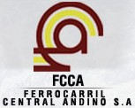 Logo Ferrocarril Central Andinos